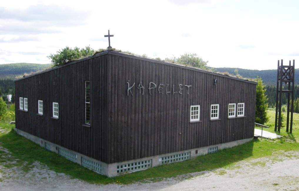 Fåvangfjellet sportskapell, Ringebu kommune